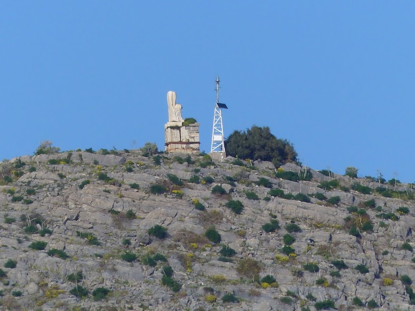 Statue du 2ème siècle après J.C. située sur l'îlot de Rafti, dans le golfe de Porto Rafti. Attique. Grèce